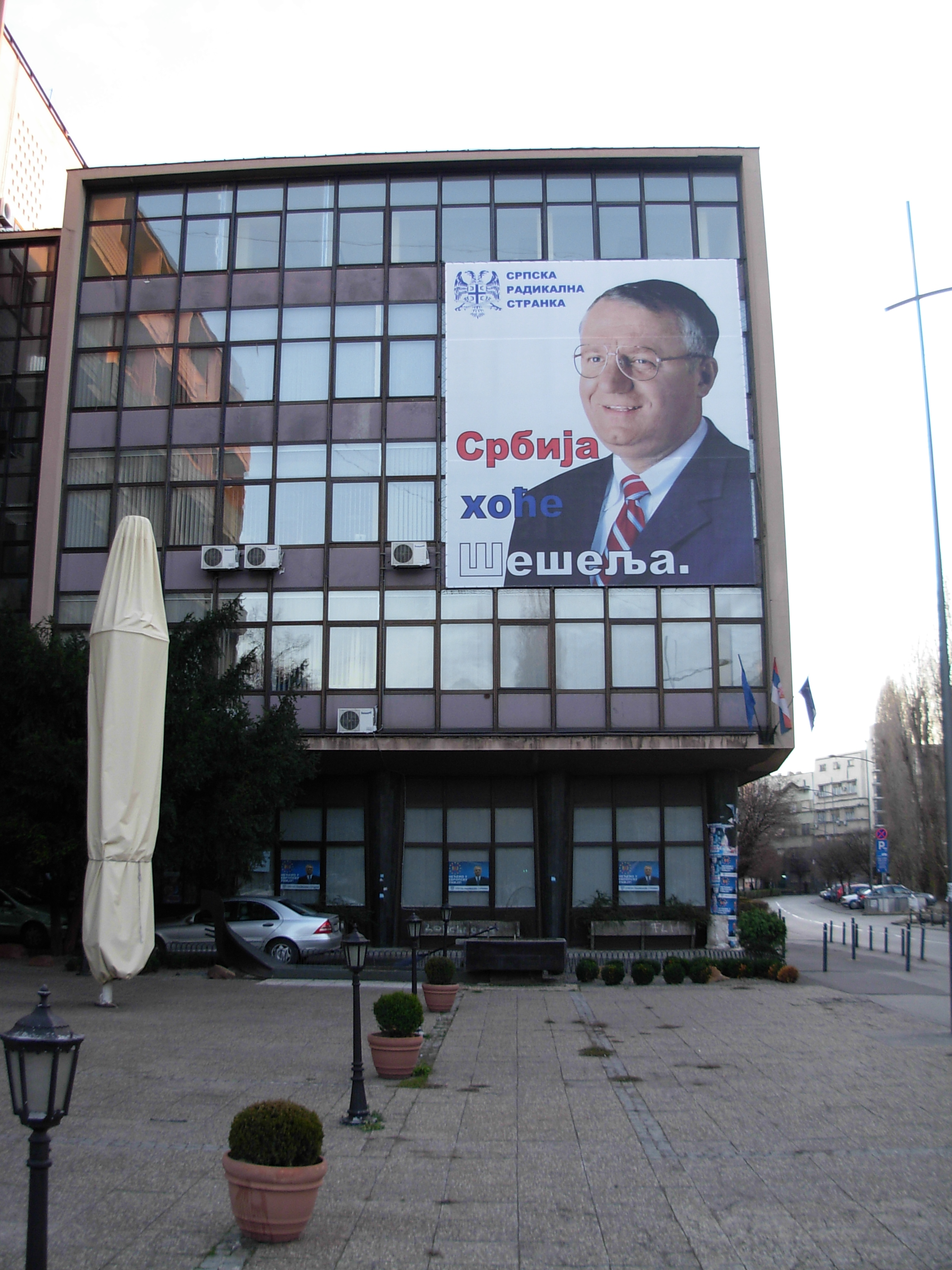 Sedište Srpske radikalne stranke u Novom Sadu, januar 2012.